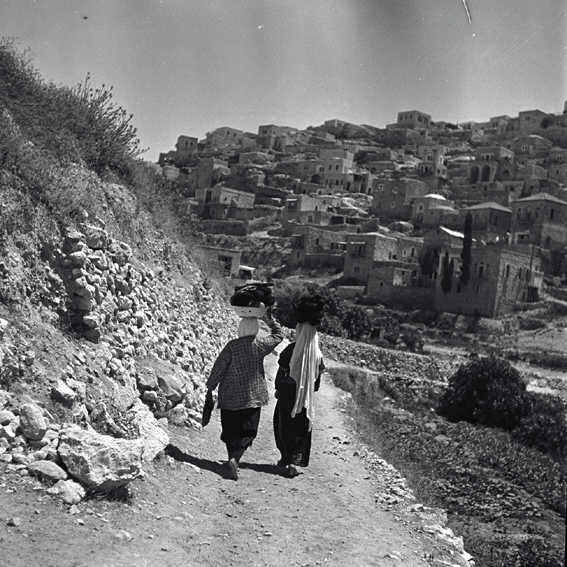 כפר השילוח - מראה